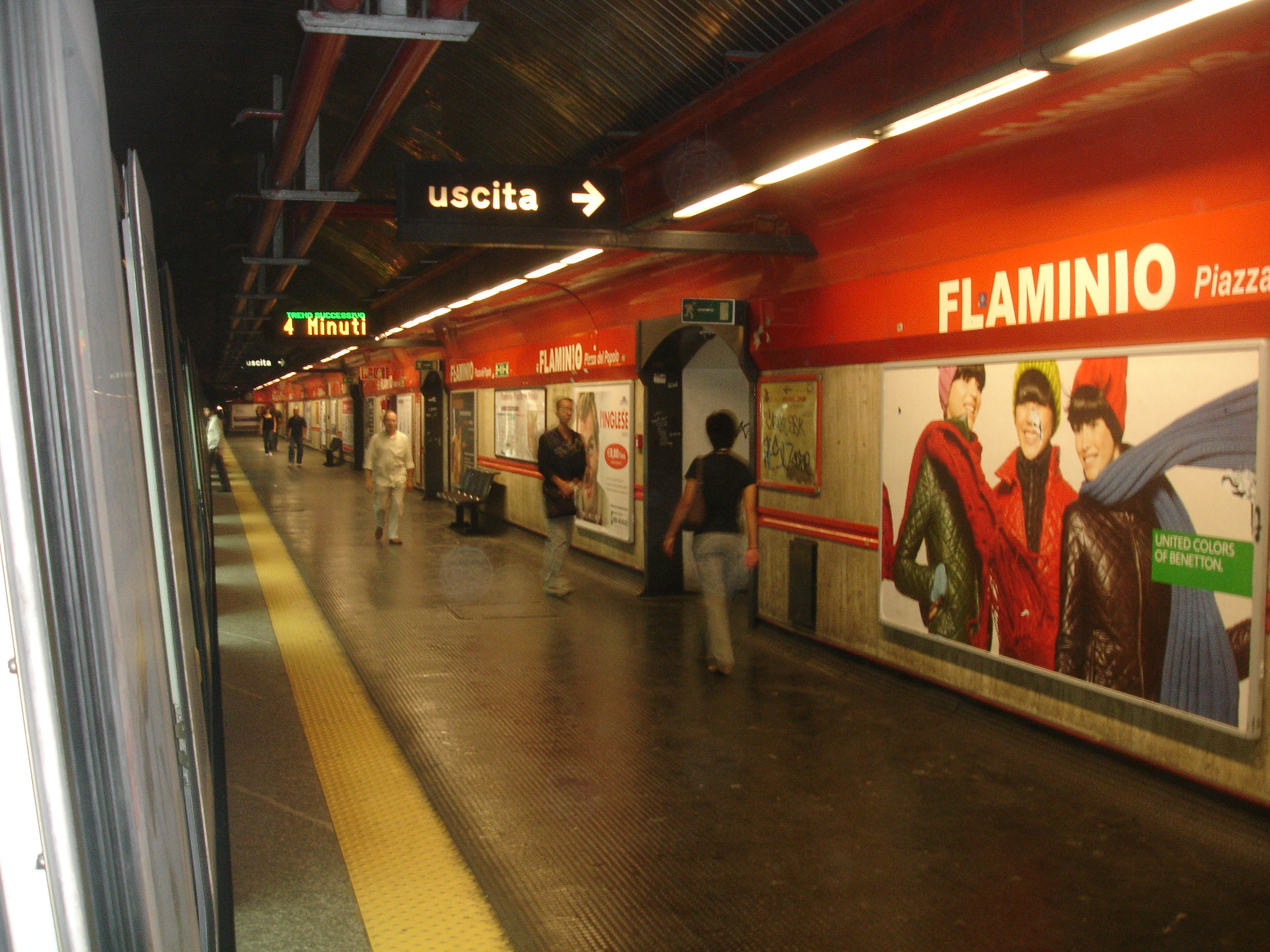 Uno scorcio della stazione Flaminio.